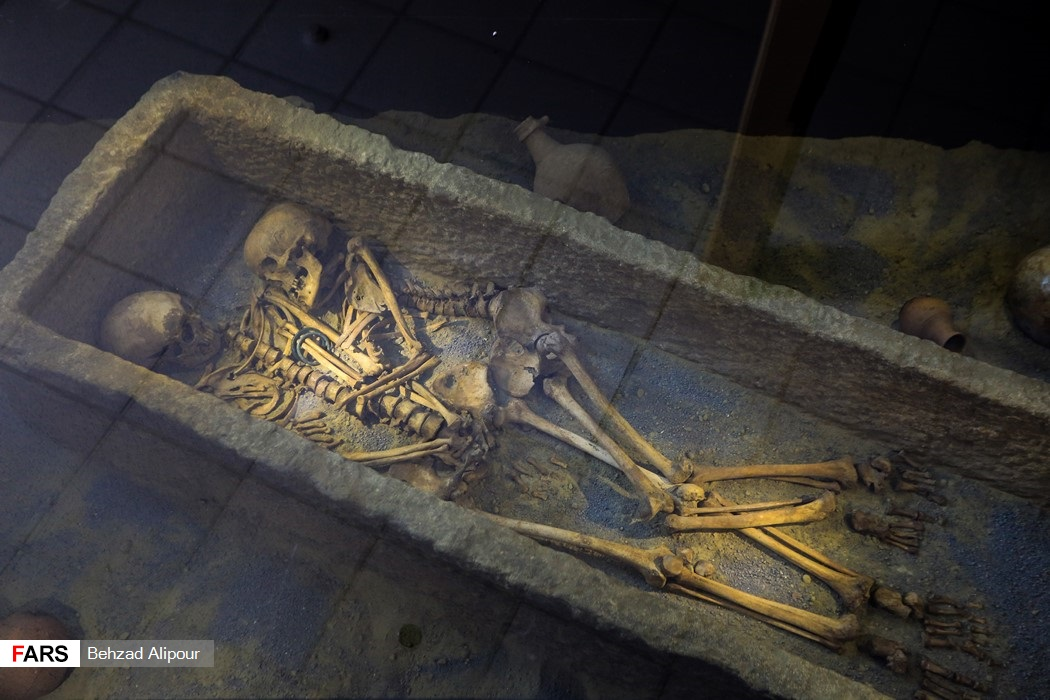 تپه هگمتانه